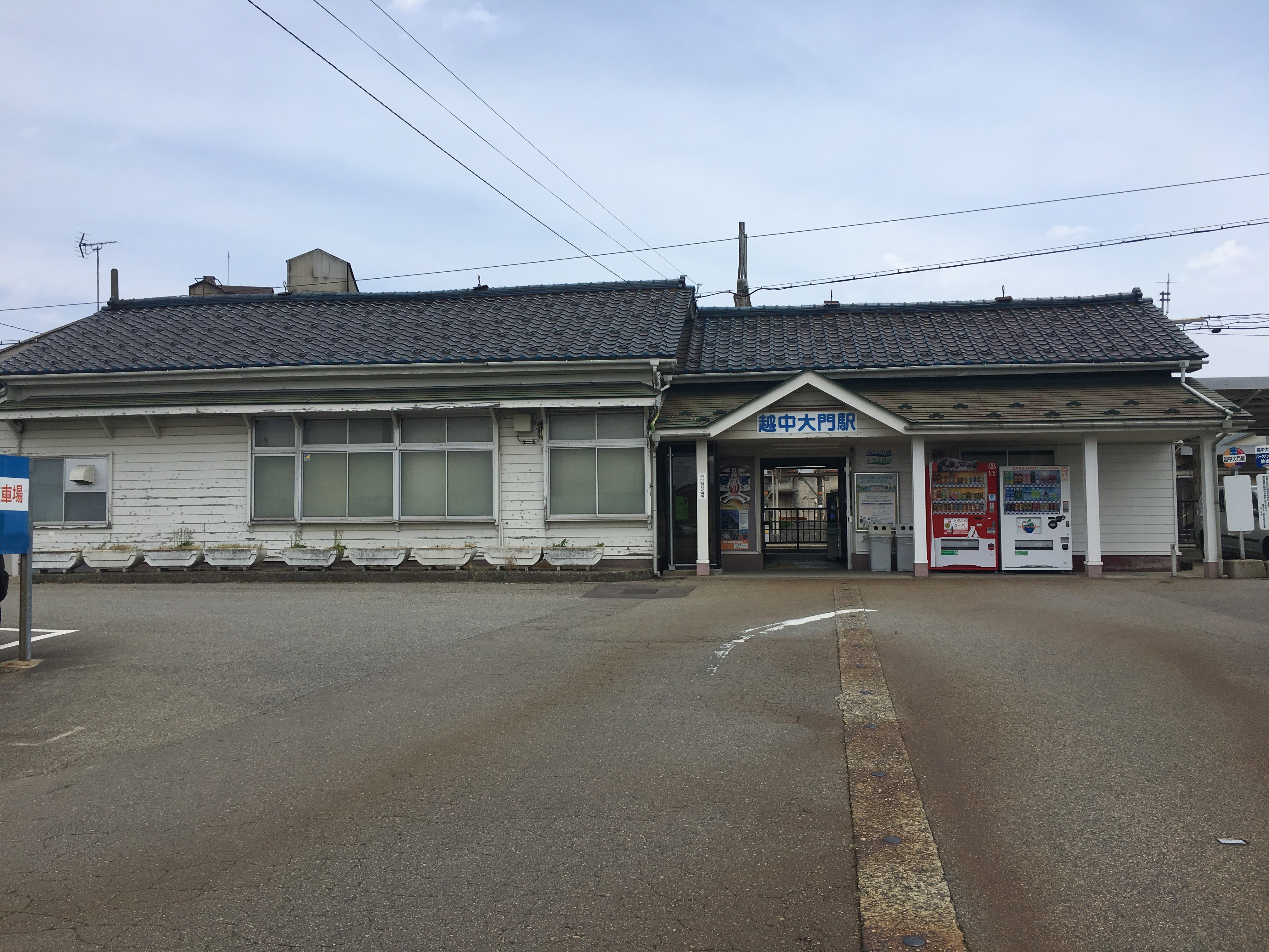 あいの風とやま鉄道越中大門駅駅舎